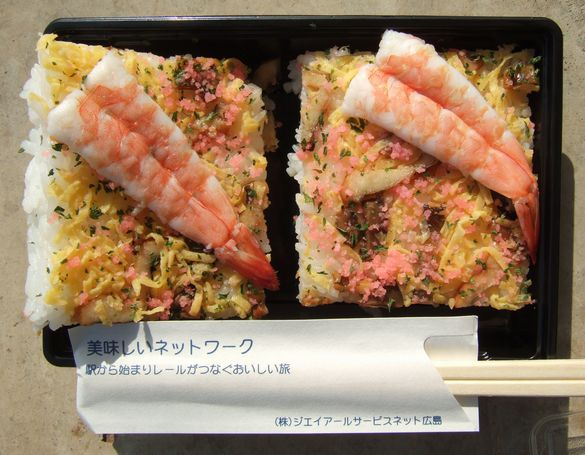 Sample of Iwakuni Sushi(岩国寿司の一例 海老は後乗せ)